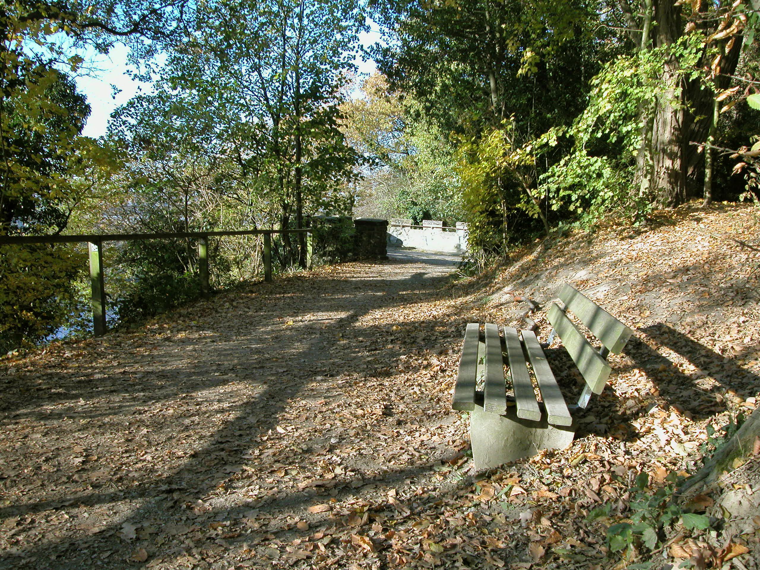 Rad- und Fußwanderweg über den Kahlenberg Kamera-Position: 51°24′47.25″N 6°52′59.36″E / 51.413125°N 6.8831556°E